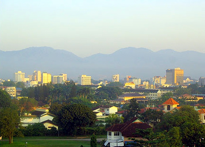 Permandangan Bandaraya Ipoh dari Hotel Casuarina